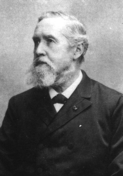 Eugen Heinrich Gugel (1832-1905)